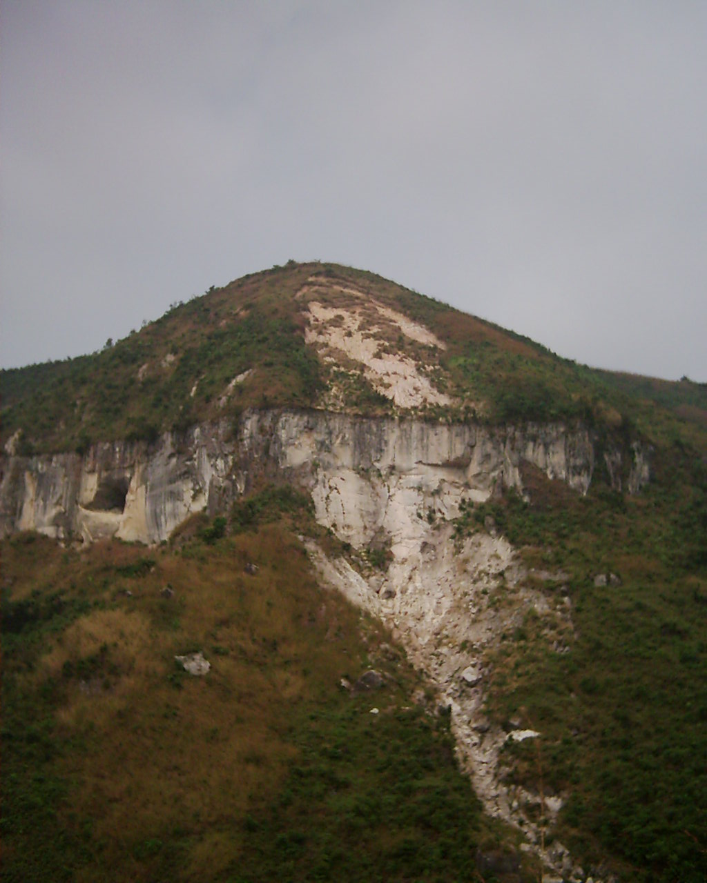 Mont Mangengenge, Kinshasa, RDC, summer 2003 Personal picture, I set it in public domain.